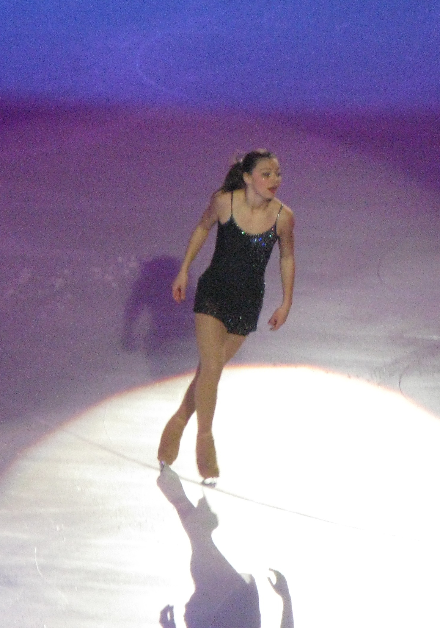 Léna Marrocco, Gala des champions, Trophée Eric Bompard 2010, Paris